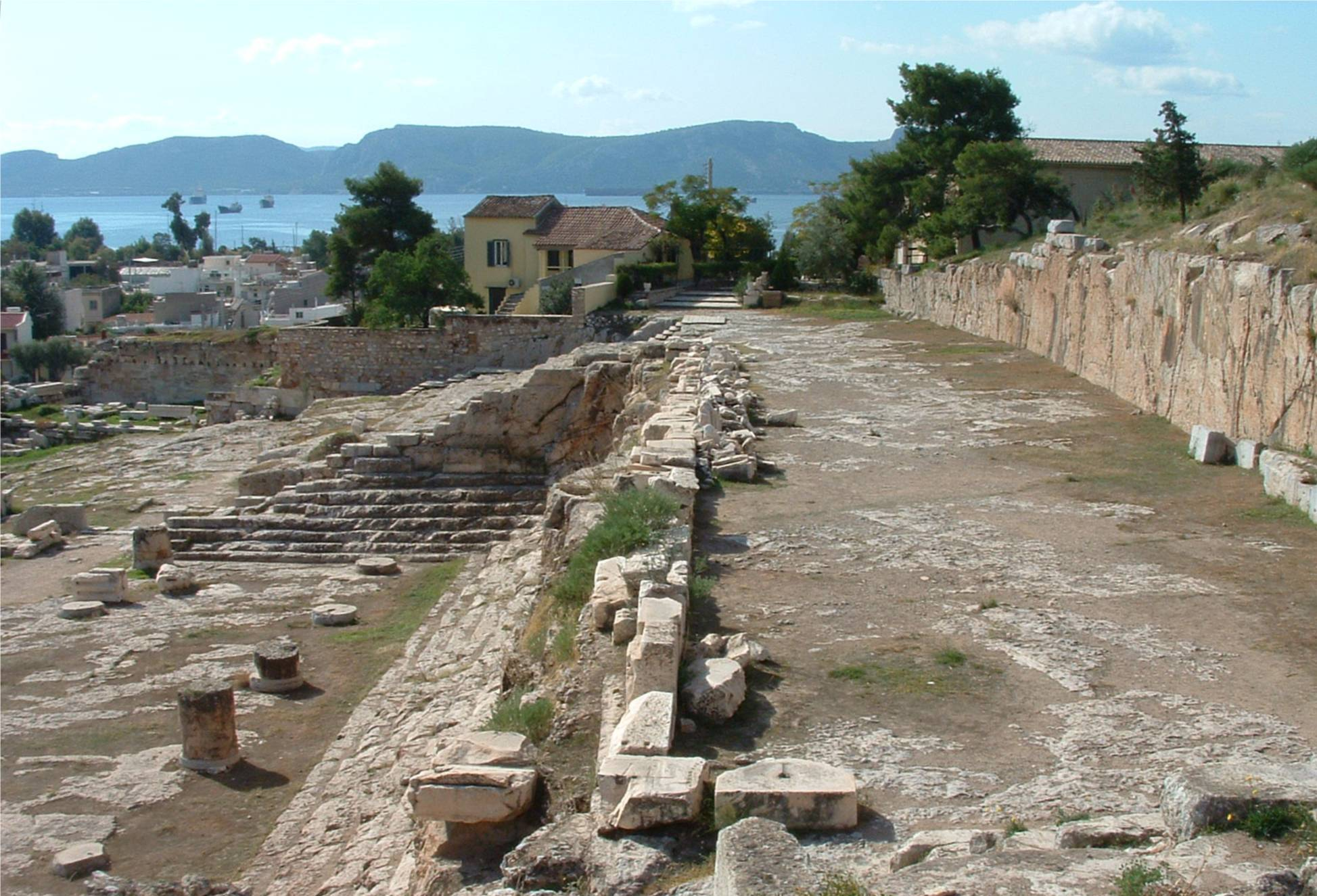 30/10/2005 Categorie:Afbeelding oudheid